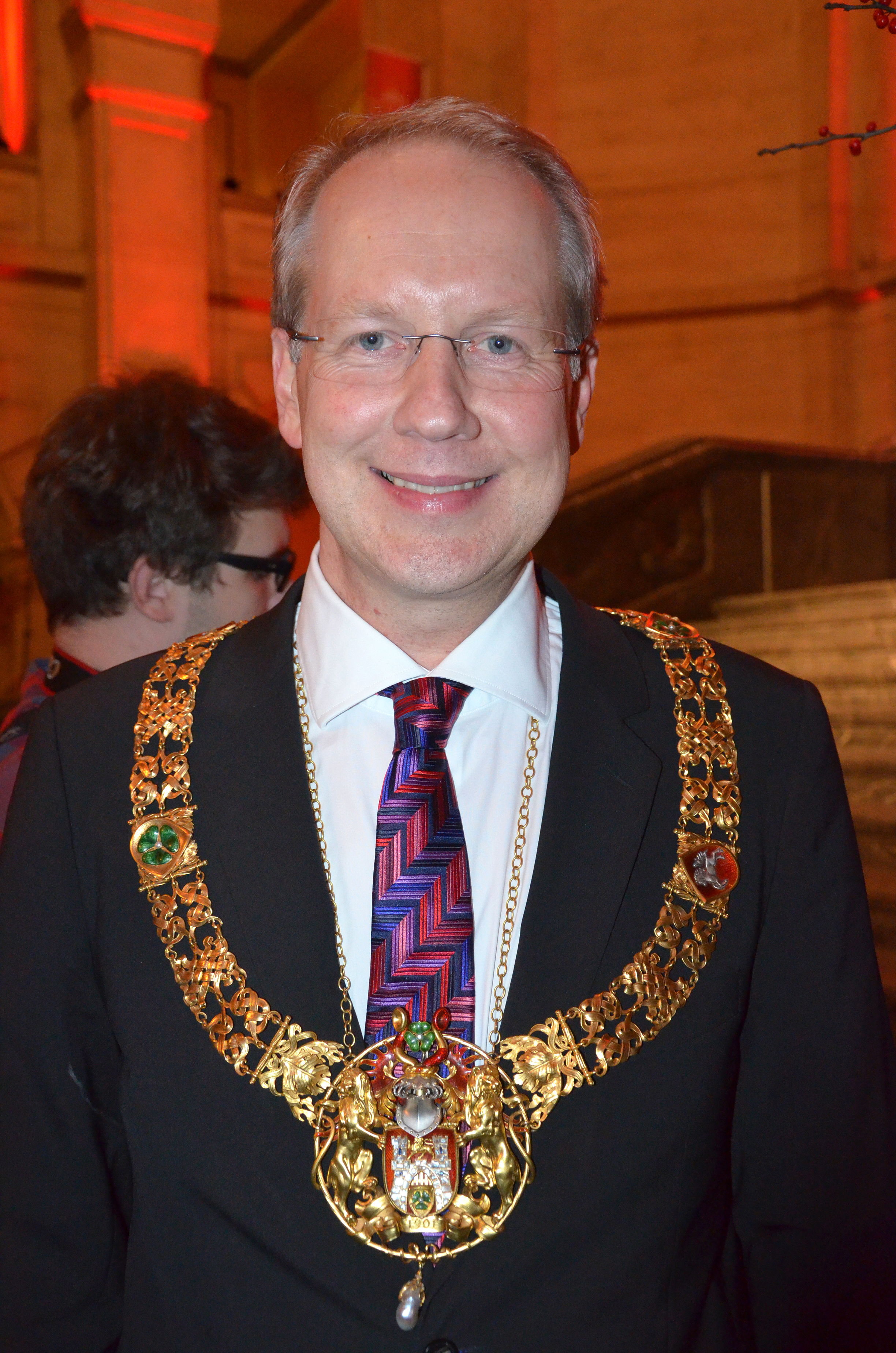 Als Oberbürgermeister hatte Stefan Schostok 2014 - erstmals in der Geschichte der Stadt Hannover - zum Neujahrsempfang sämtliche Bürger der niedersächsischen Landeshauptstadt in das Neues Rathaus eingeladen. Zur Begrüßung hatte der "OB" die offizielle Amtskette umgelegt, die 1901 von der Firma „W. Lameyer & Sohn, Fabrikation, Handlung und Lager von Juwelen, Gold- und Silberarbeiten“ angefertigt wurde. Anstelle des auf dem Mittelteil ursprünglich angebrachten Porträts mit dem Bildnis von Kaiser Wilhelm II. wurde 1950 das Wappen der Stadt Hannover aufgebracht ...